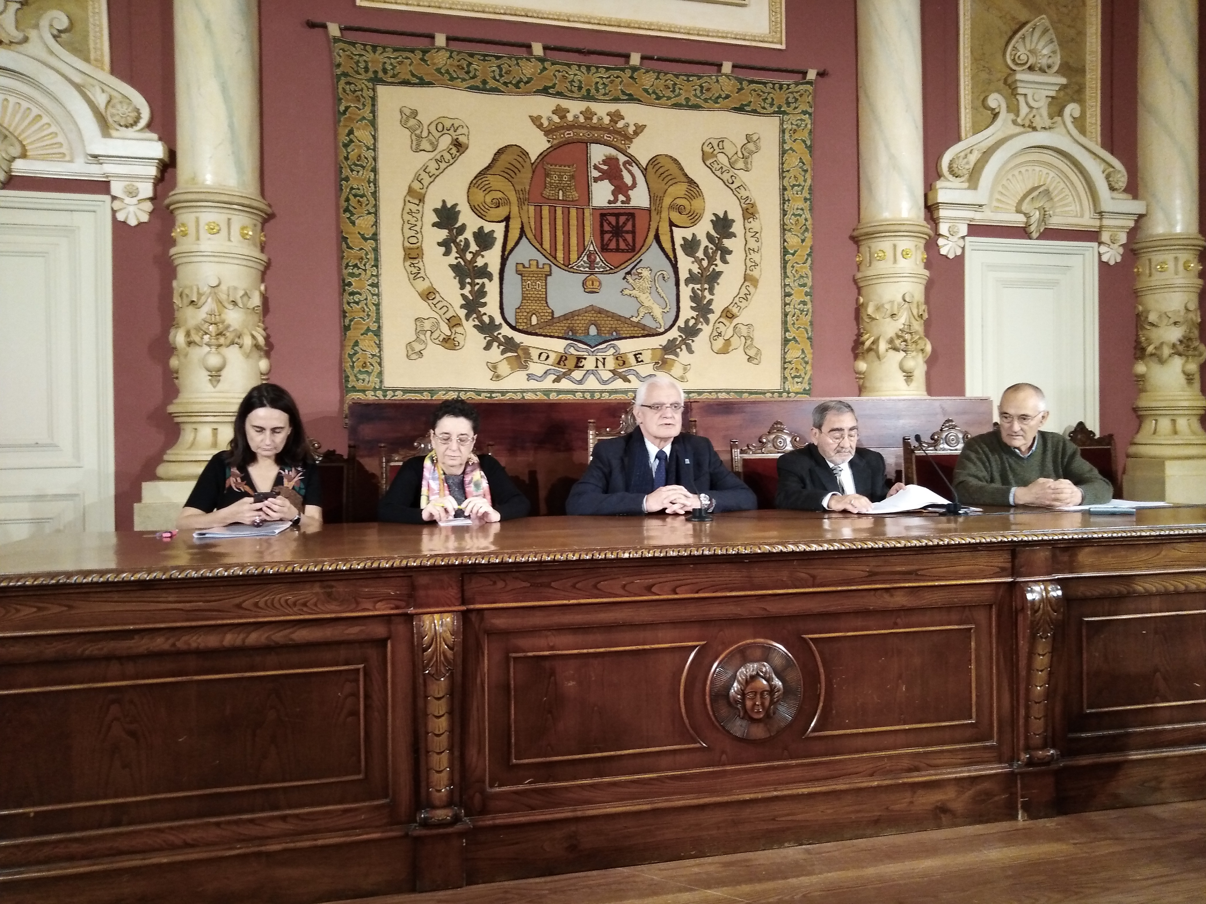 Teresa López, Rosario Álvarez, Vítor Freixanes, Juan Saco e Antón Santamarina no paraninfo do IES Otero Pedrayo de Ourense, co gallo do 150 aniversario da Gramática Gallega de Juan Antonio Saco Arce